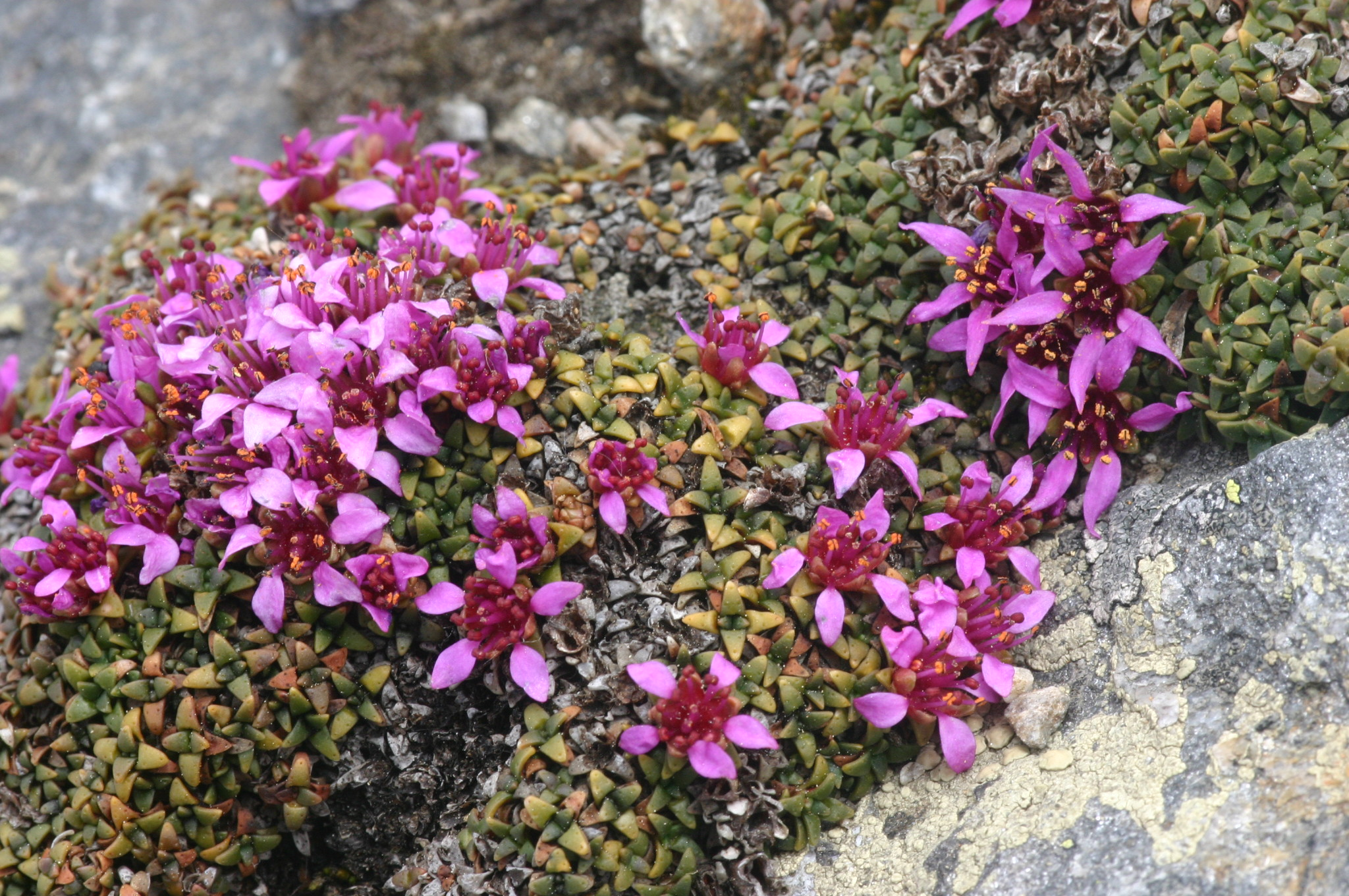 Saxifraga retusa